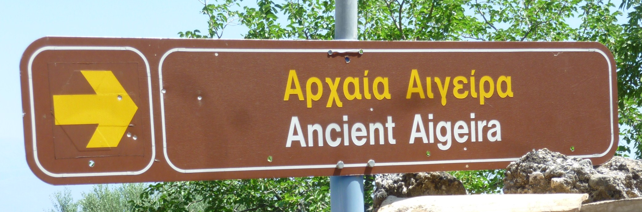 Pancarte indiquant le chemin du théâtre d'Egira, Grèce